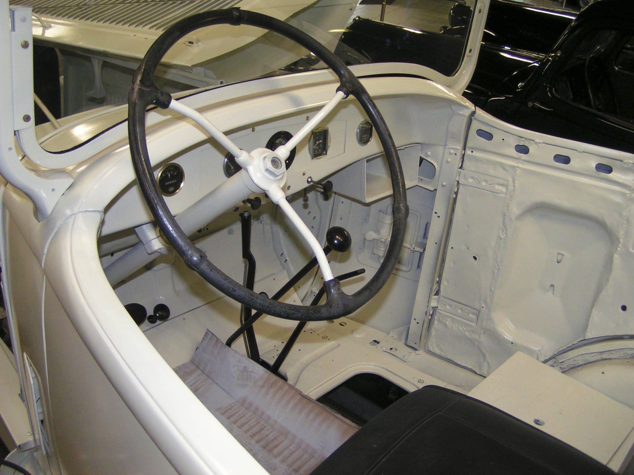 Citroen